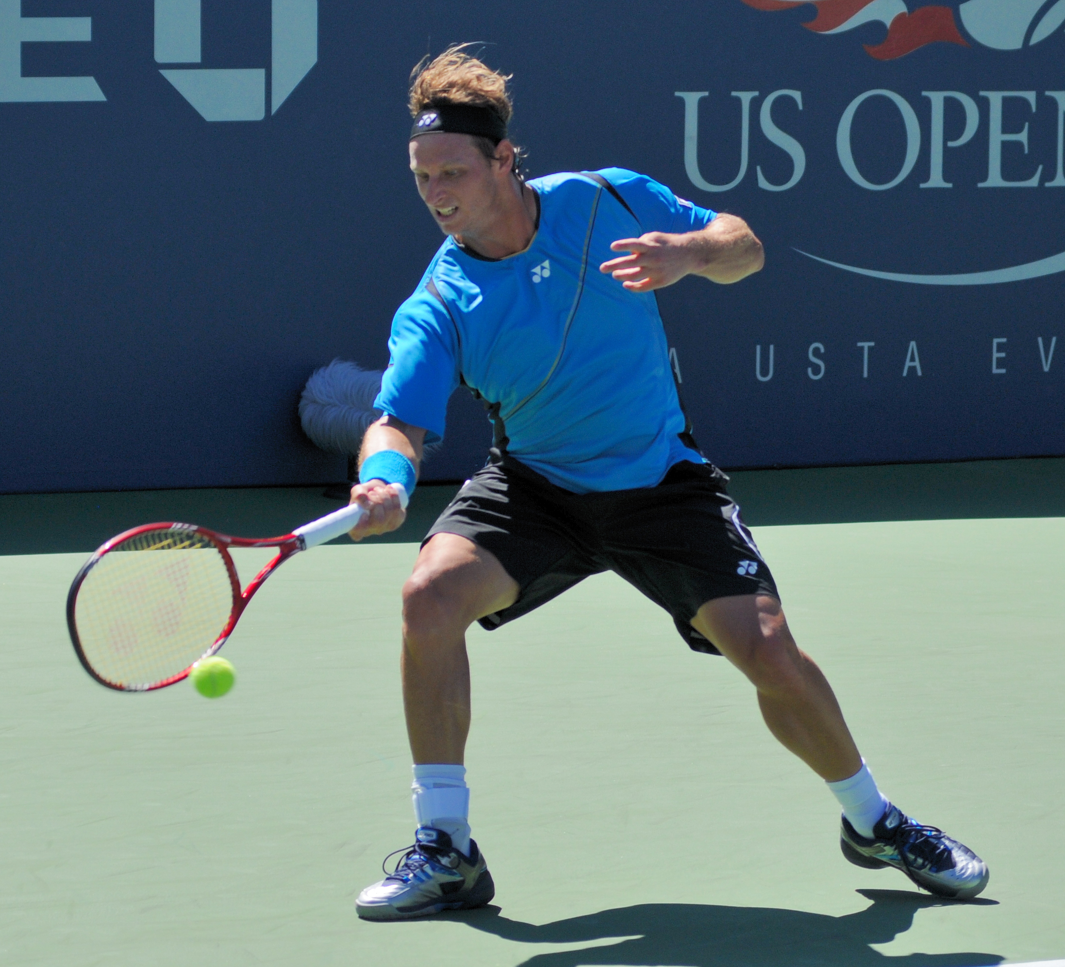 David Nalbandian - US Open 2010